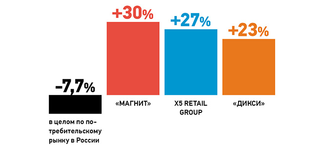 Обороты торговли крупнейших продуктовых ритейлеров России в январе - мае 2015 года